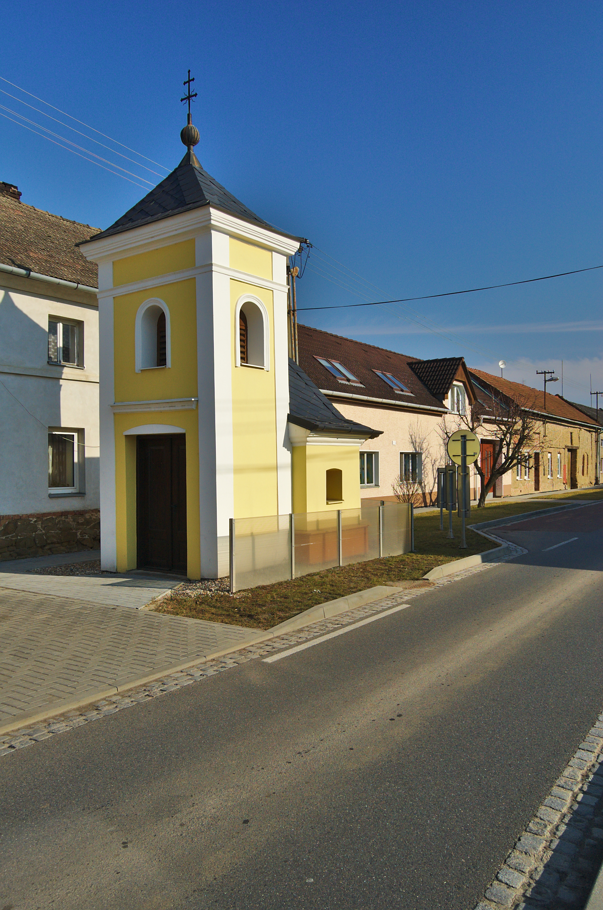 Kaplička Nejsvětější Trojice, Hablov, Olšany, okres Prostějov